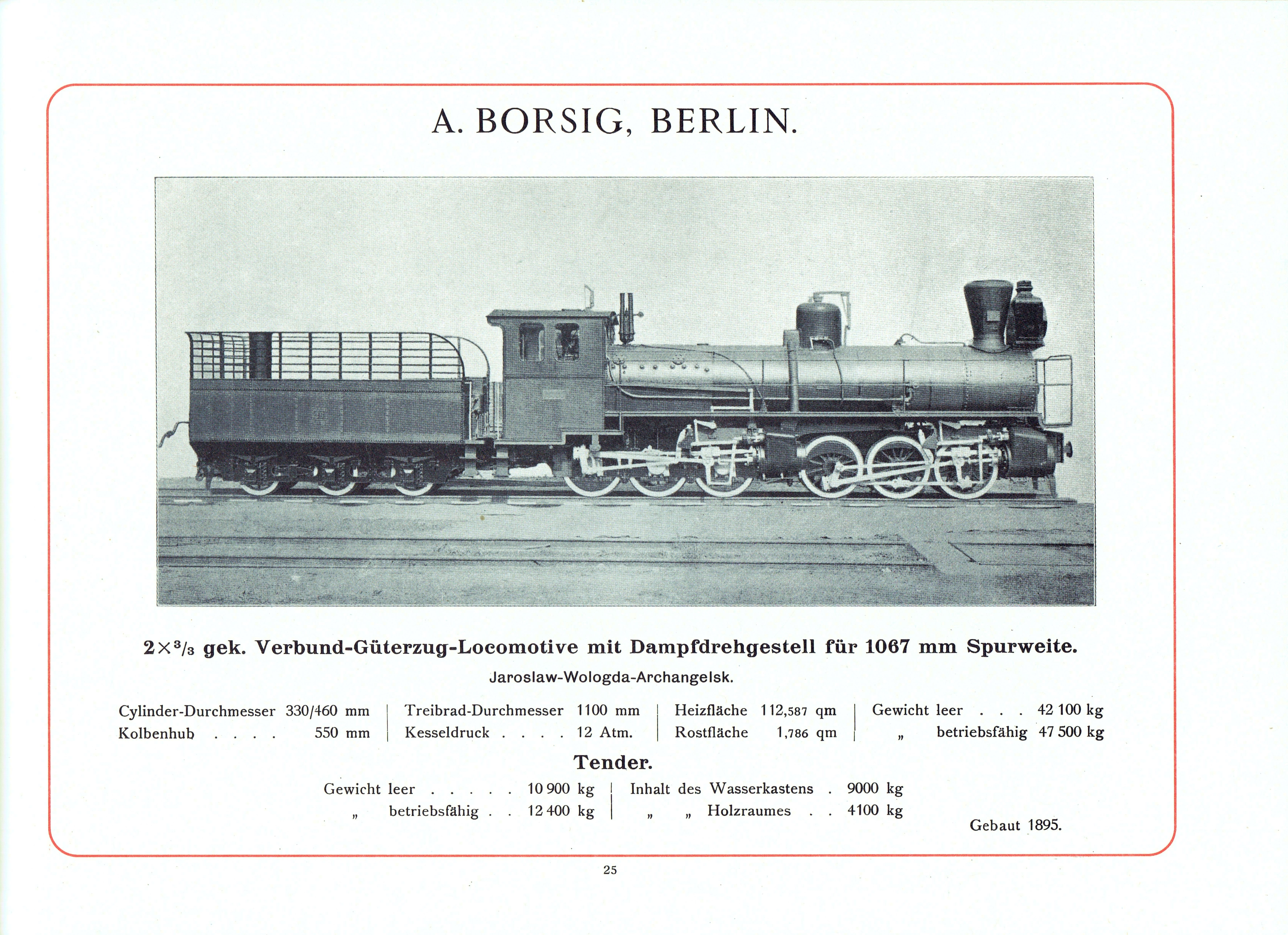 A. Borsig, Berlin - 2x3/3 gek. Tender-Locomotive für 1067 mm Spurweite für Jaroslaw-Wologda-Archangelsk - Katalog 1898